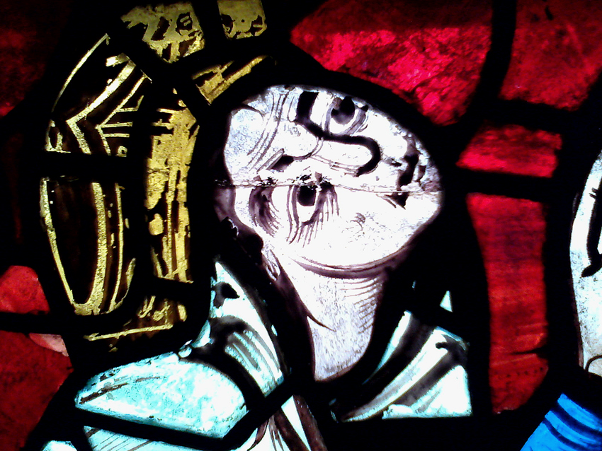 Aliénor d'Aquitaine en donatrice, détail du vitrail de la Crucifixion de la cathédrale de Poitiers (XIIe s)